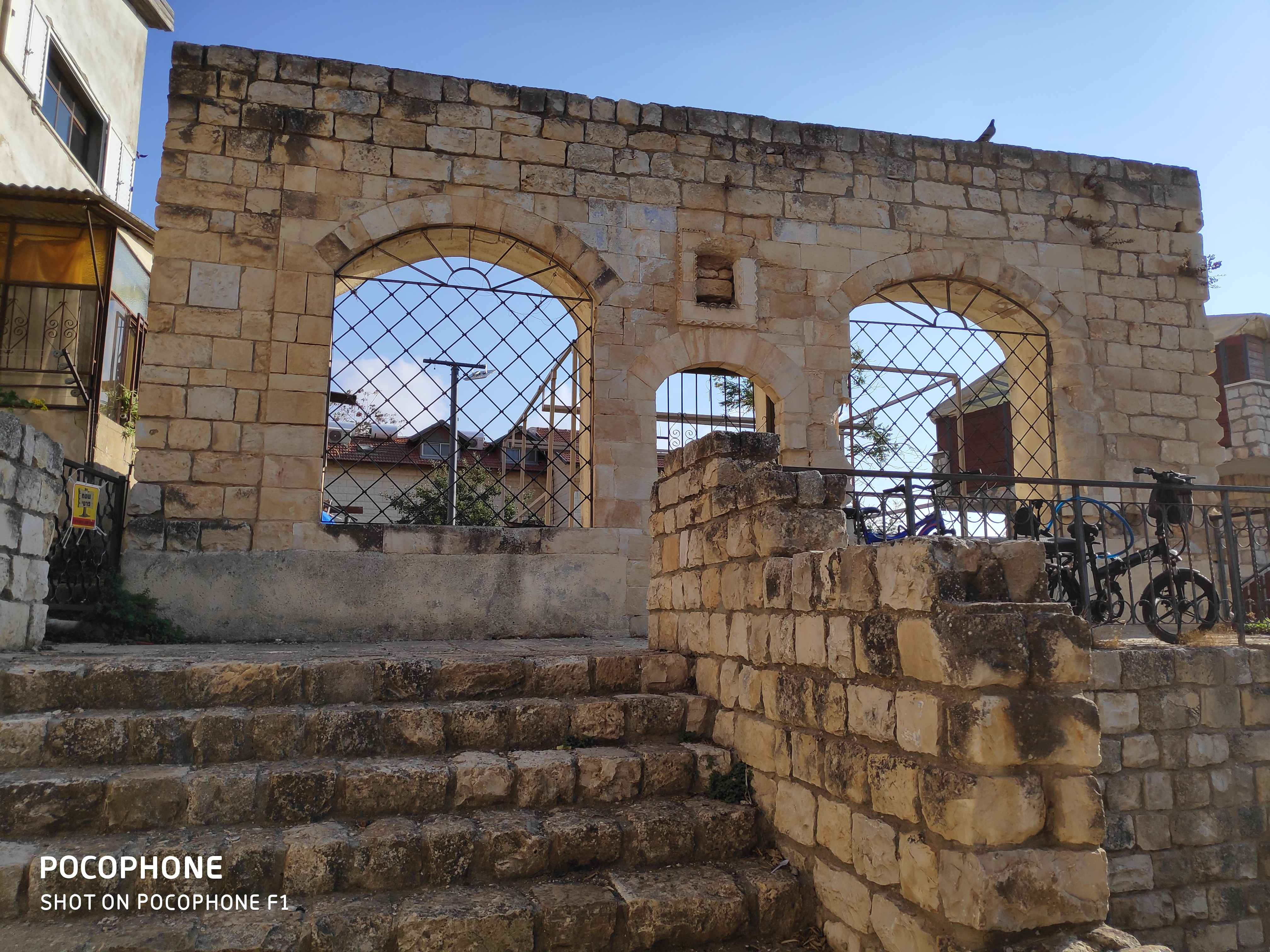 חזית בית המדרש סאדיגורה